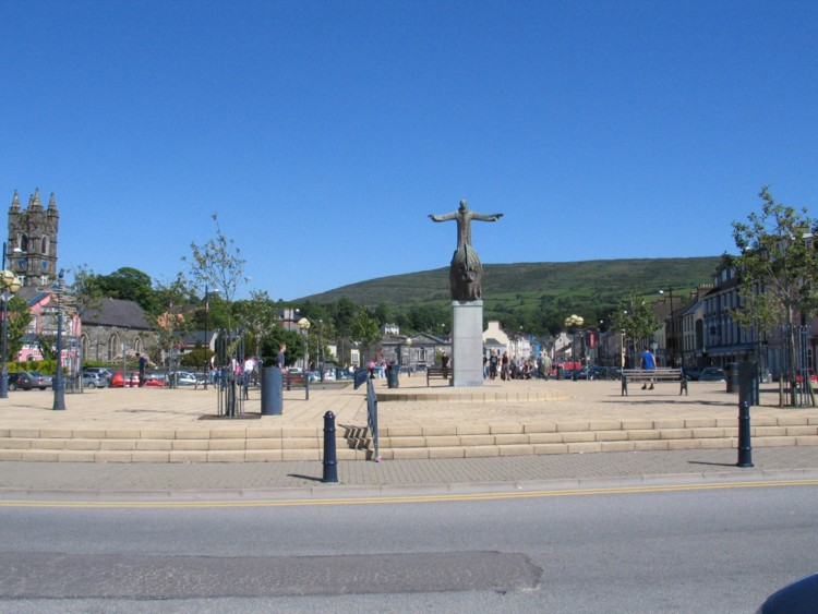 Wolfe Tone Square im Stadtzentrum